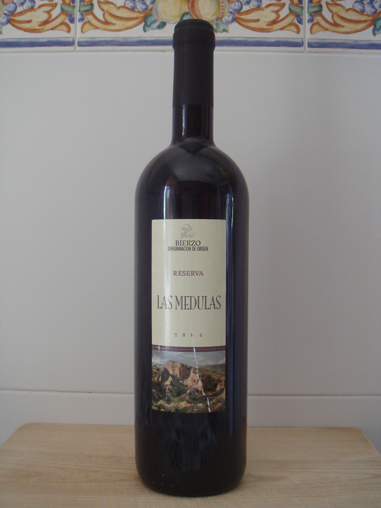 Botella de vino de la denominación de origen Bierzo, provincia de León, España.